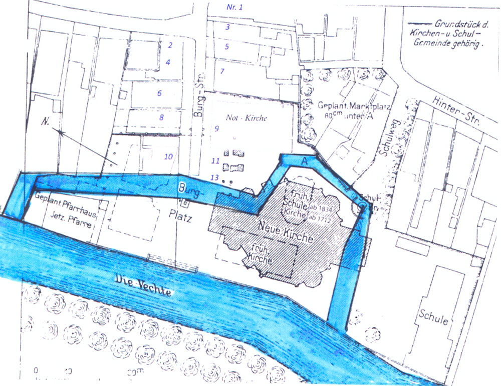 Stadtplanausschnitt 1910/11 von Nordhorn mit Ausweisung des Baugebiets und Einzeichnung der alten Gebäude (Residenz, Kirchlein) sowie der geplanten Kirche.